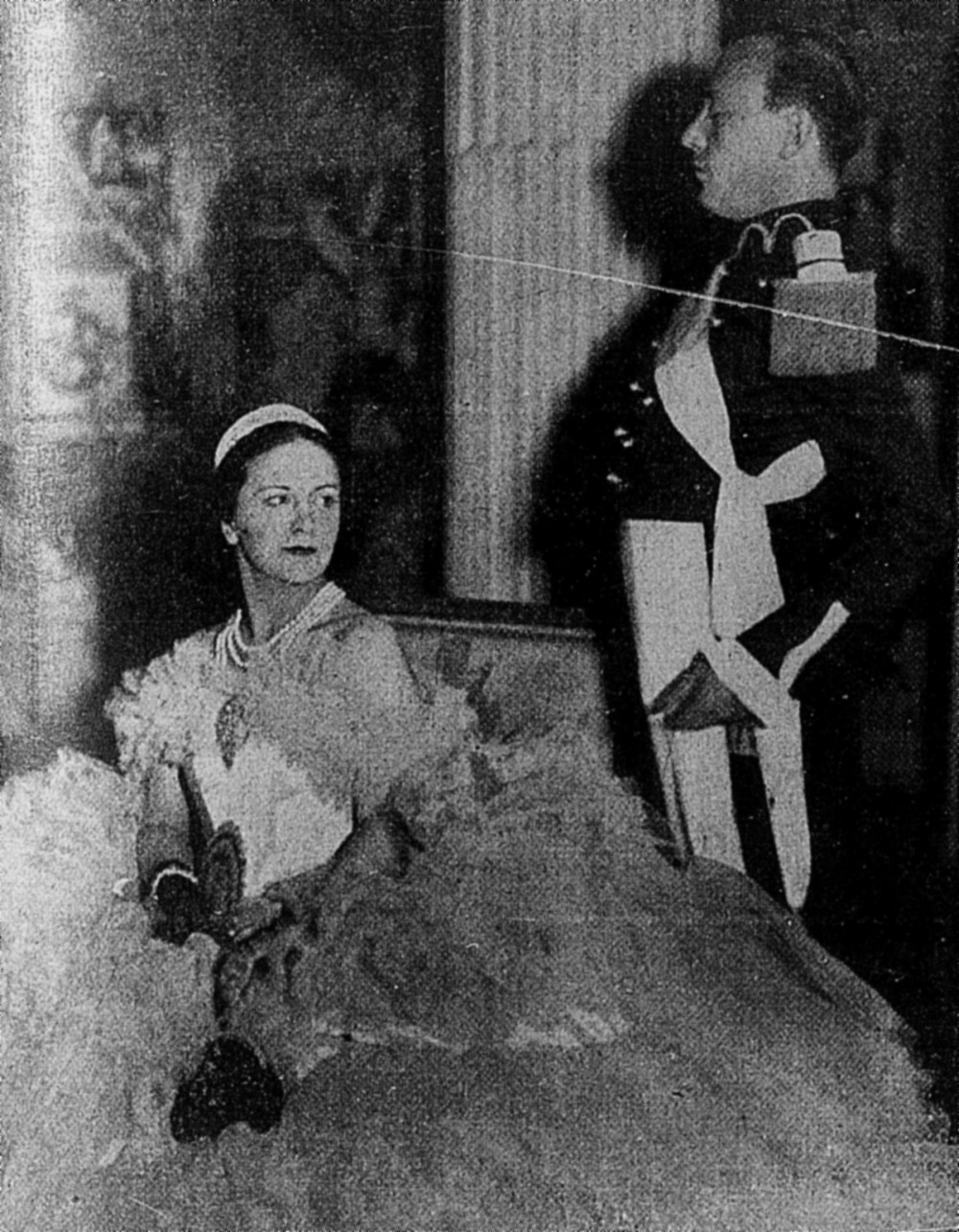 Madame Thierry e Philippe de Rotschild em baile de gala com vestes do segundo reinado, Paris, 1938. (publicado em Revista da Semana)